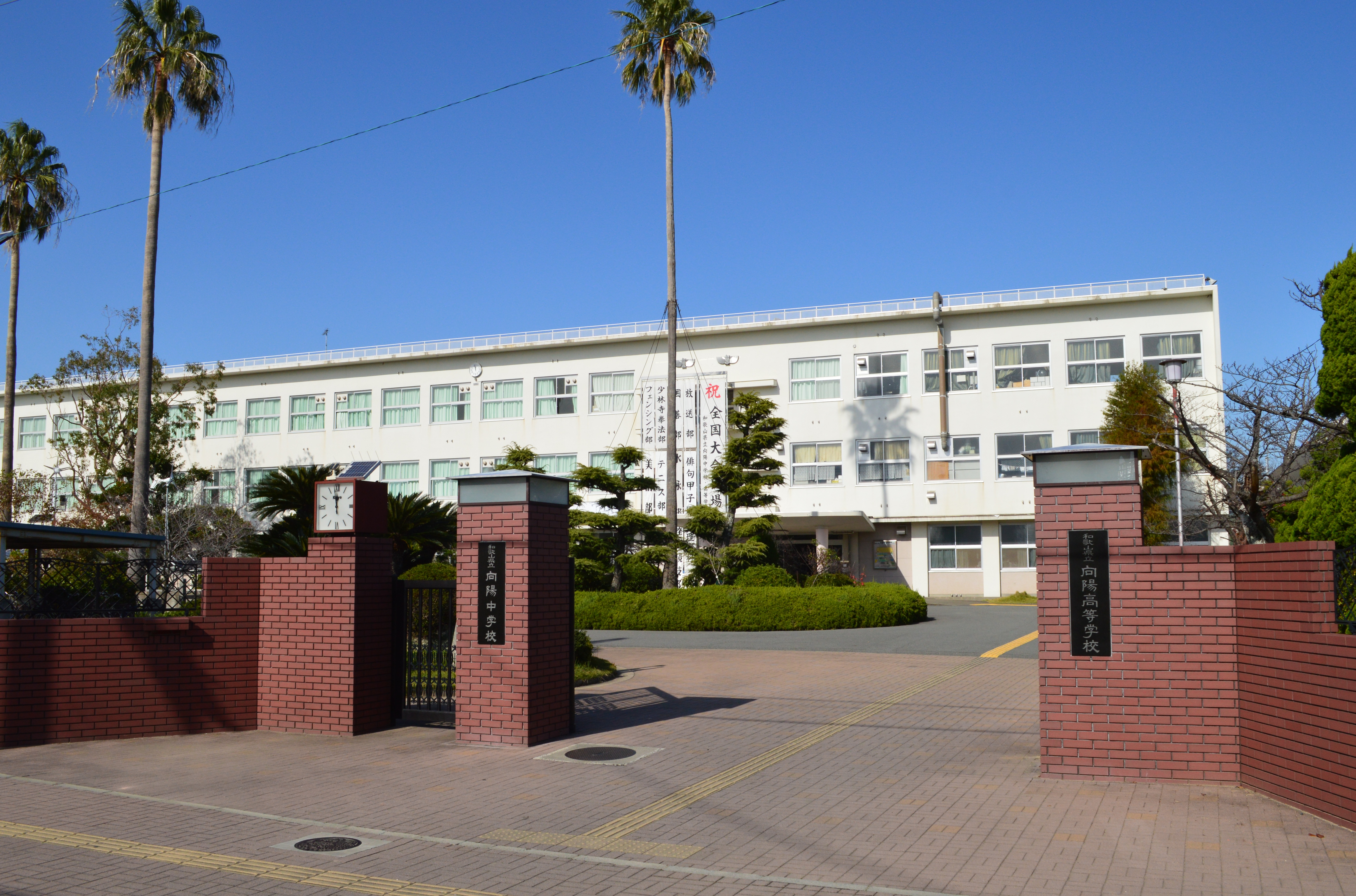 和歌山県立向陽中学校・高等学校 校門